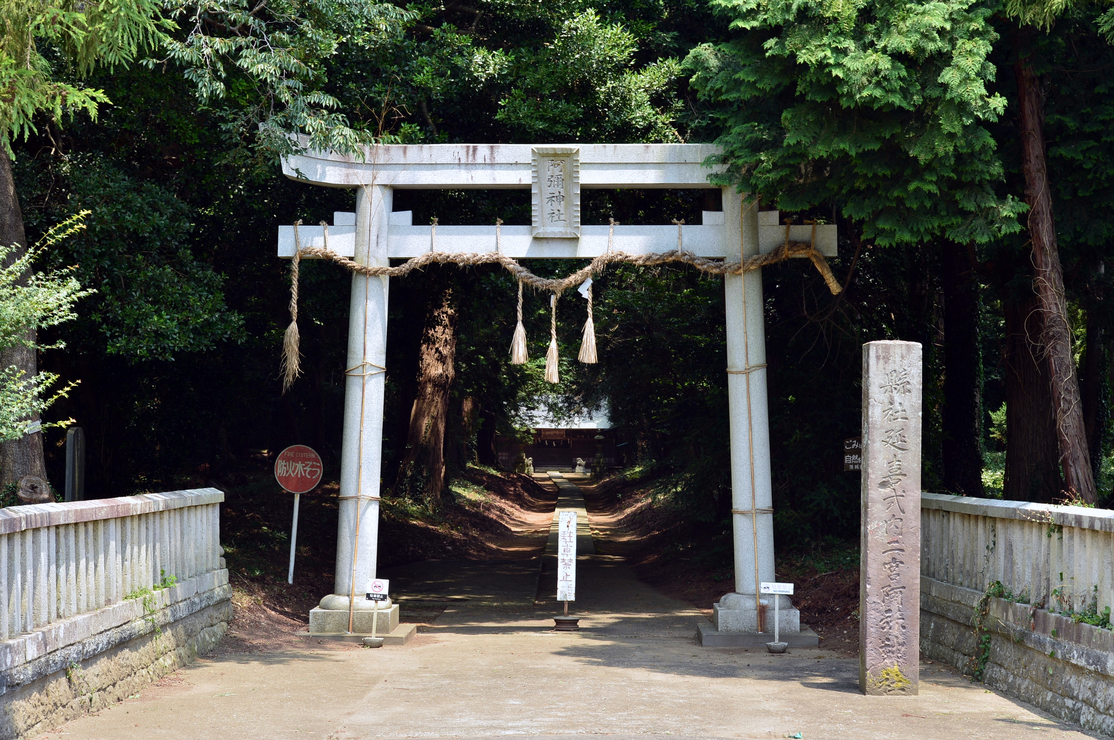 阿彌神社 (阿見町竹来) の鳥居